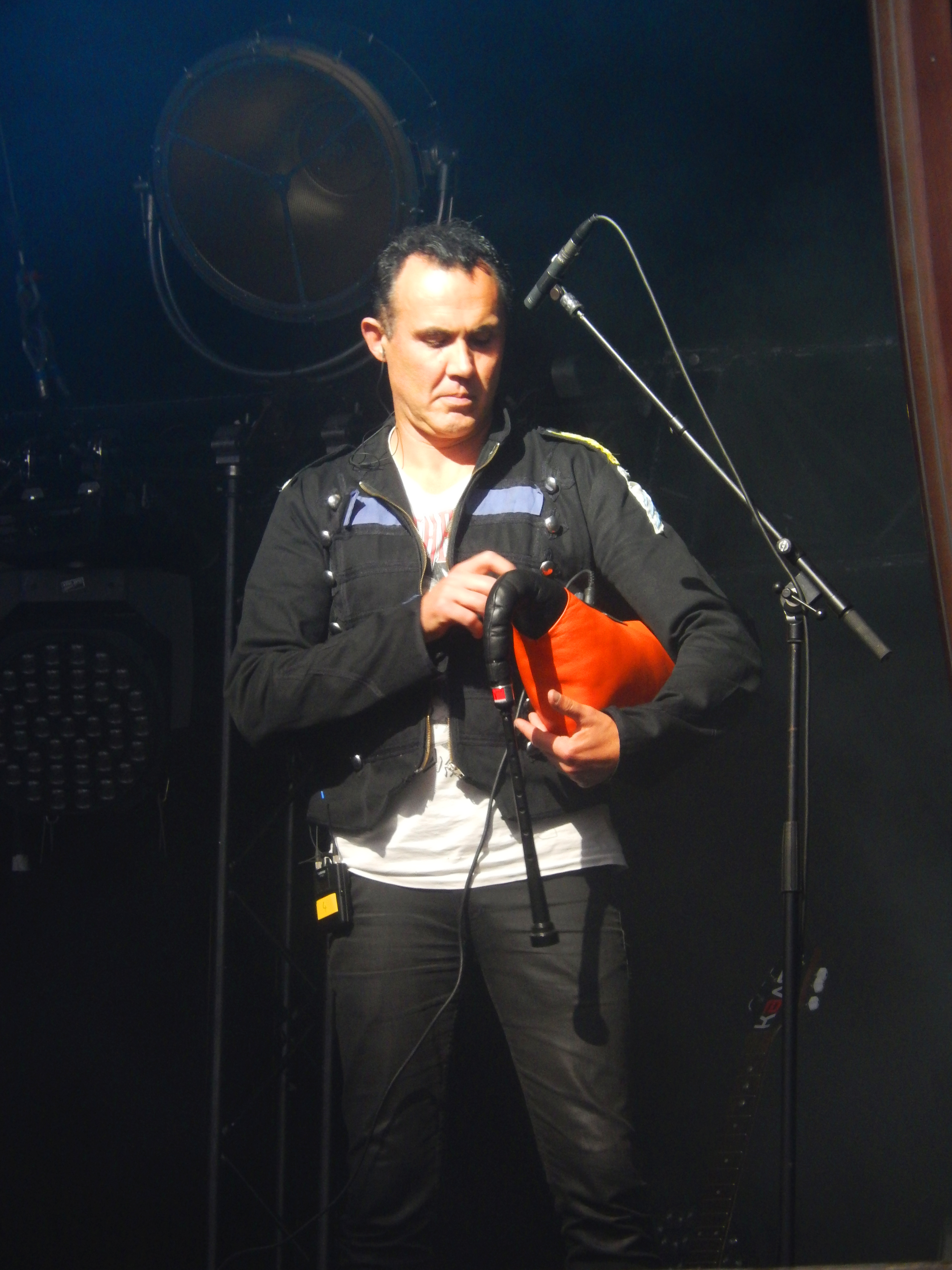 Konan Mevel au MIDI-pipe avec Alan Stivell en concert à Paimpol au Festival du chant de marin le 12 août 2017.